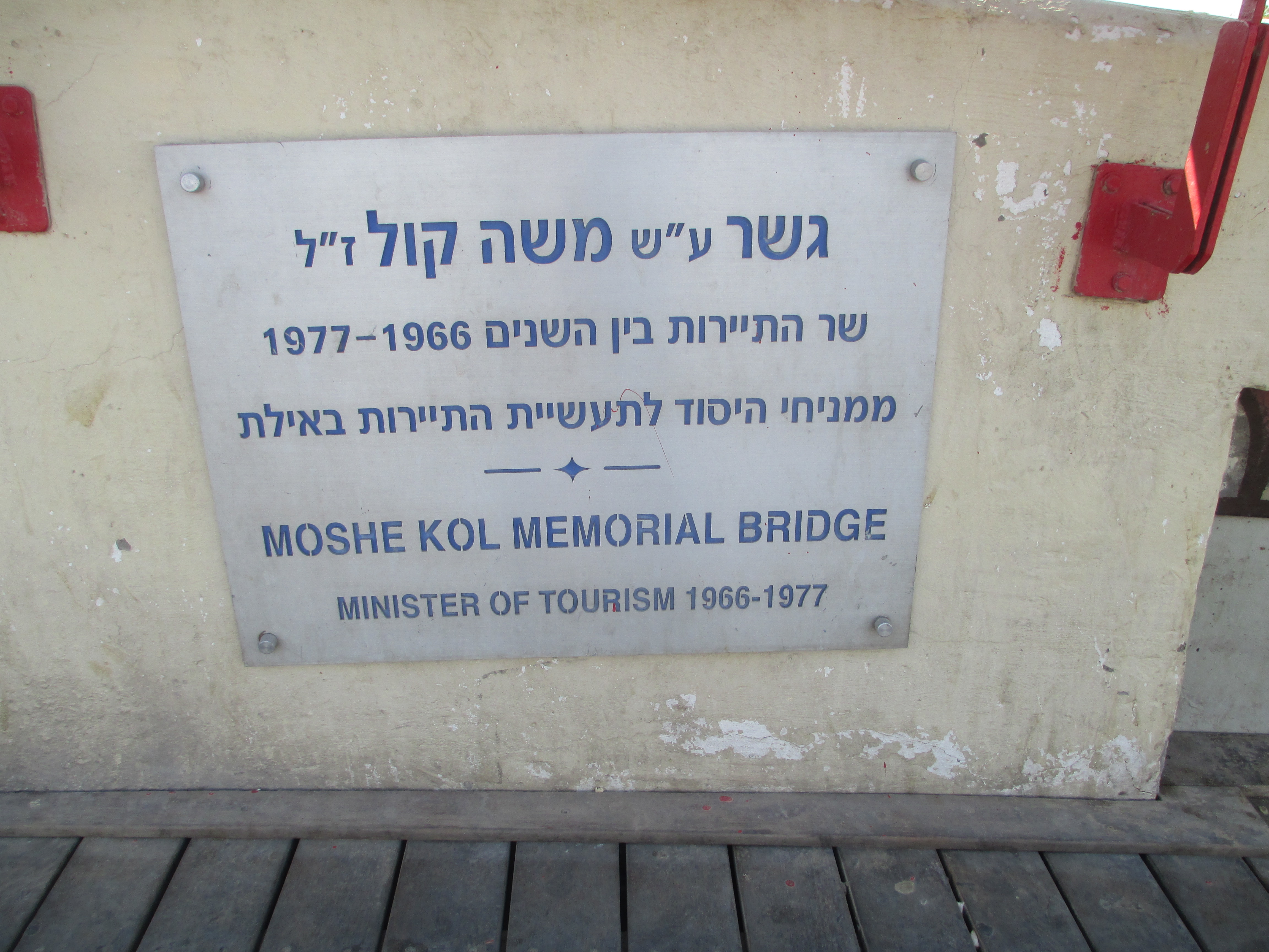 גשר משה קול באילת